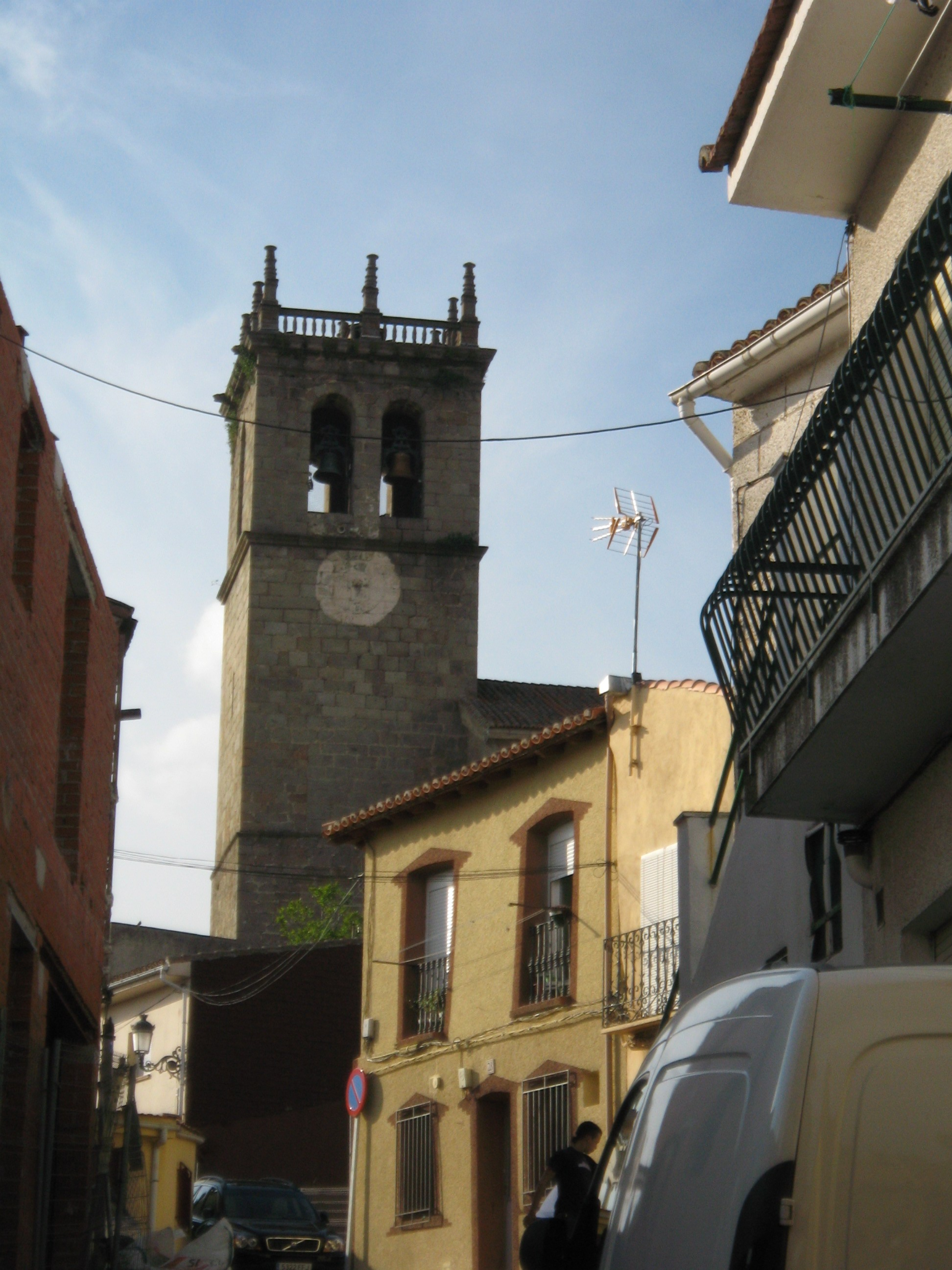 Church in Robledo de Chavela:Tower of the Iglesia de la Asunción de Nuestra Señora.